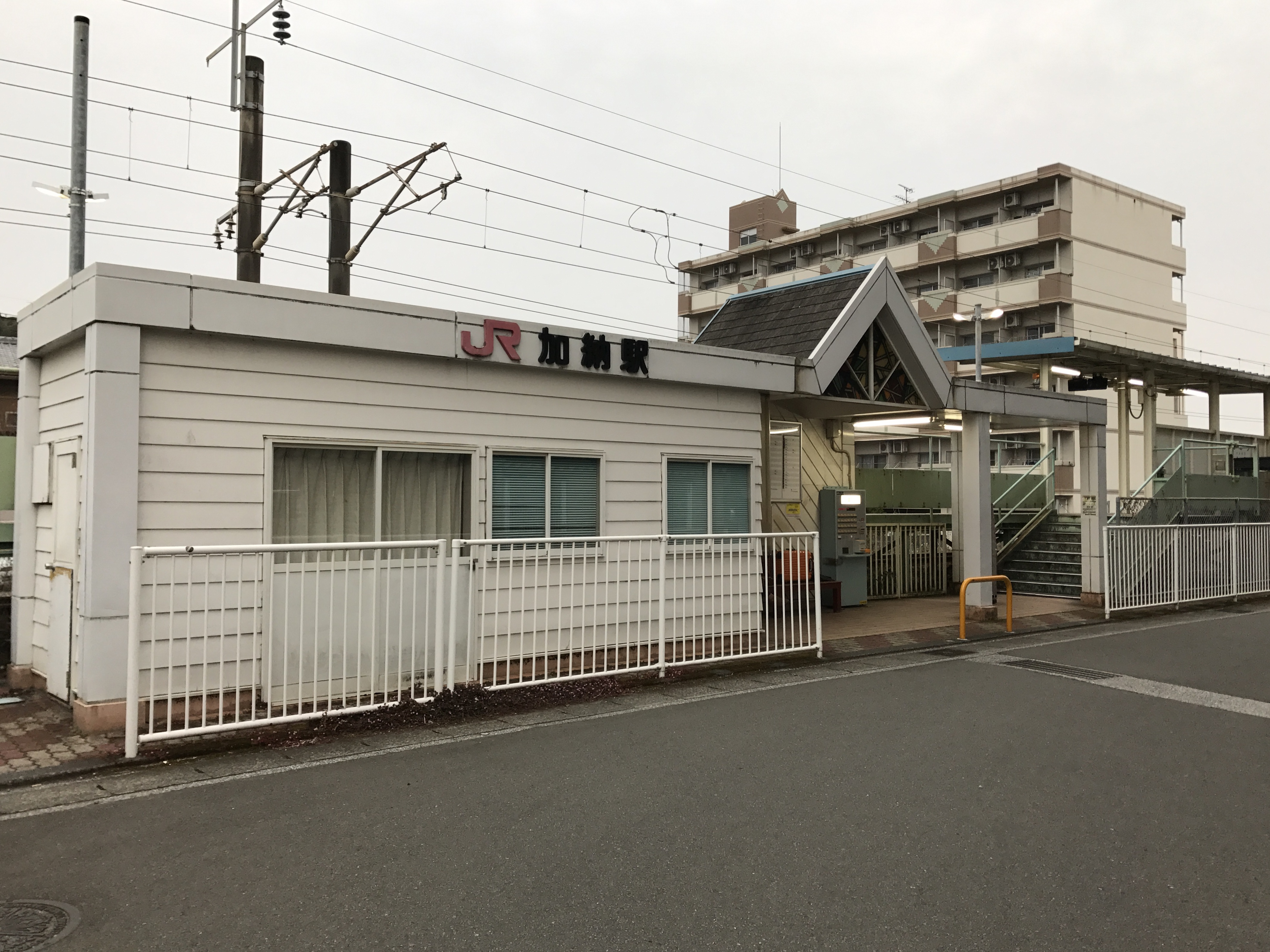 加納駅(宮崎県)の駅舎